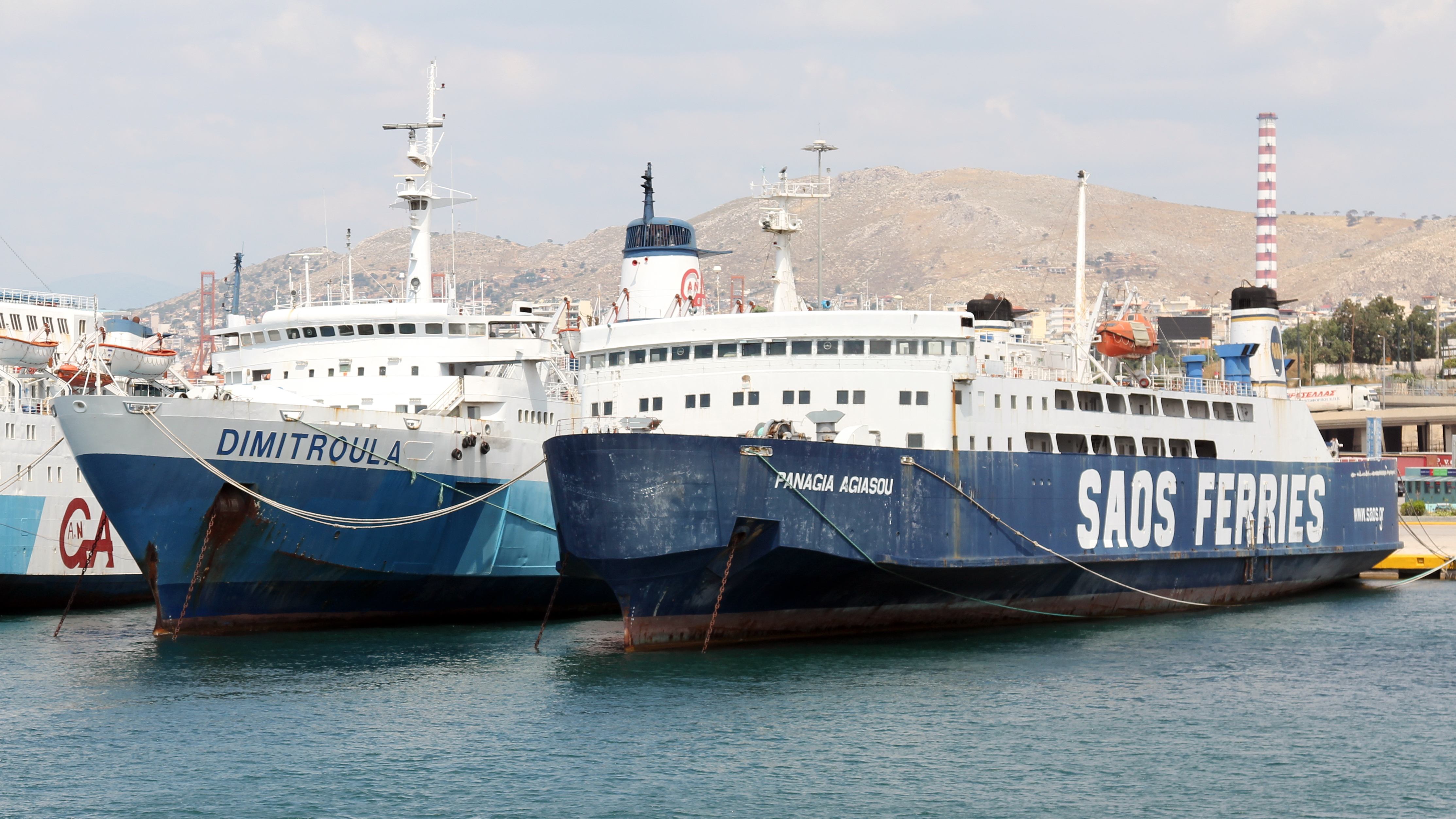 Νεκροταφείο πλοίων: "Δημητρούλα" και "Παναγία Αγιασού".